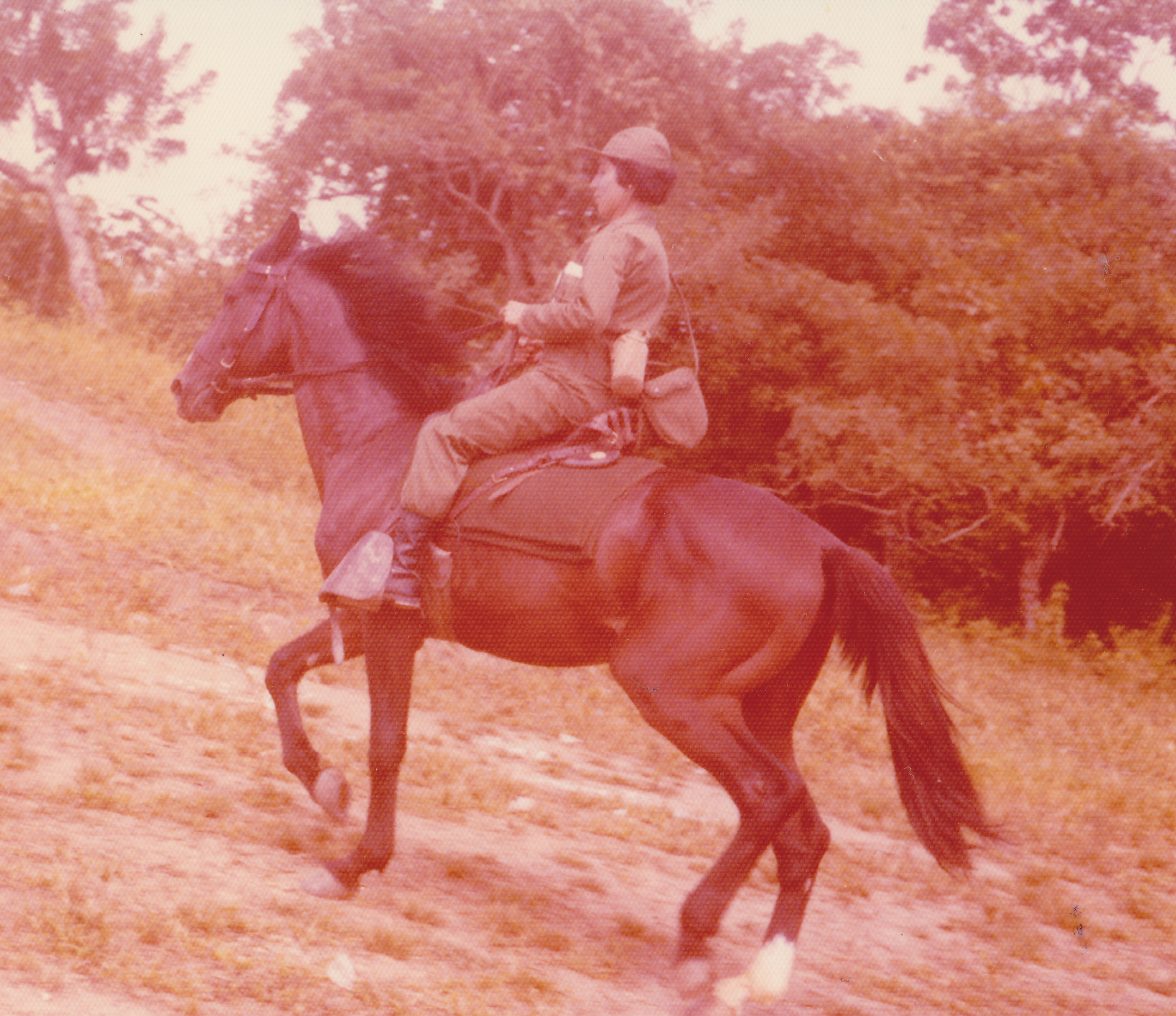 Anita Velasteguis' early years